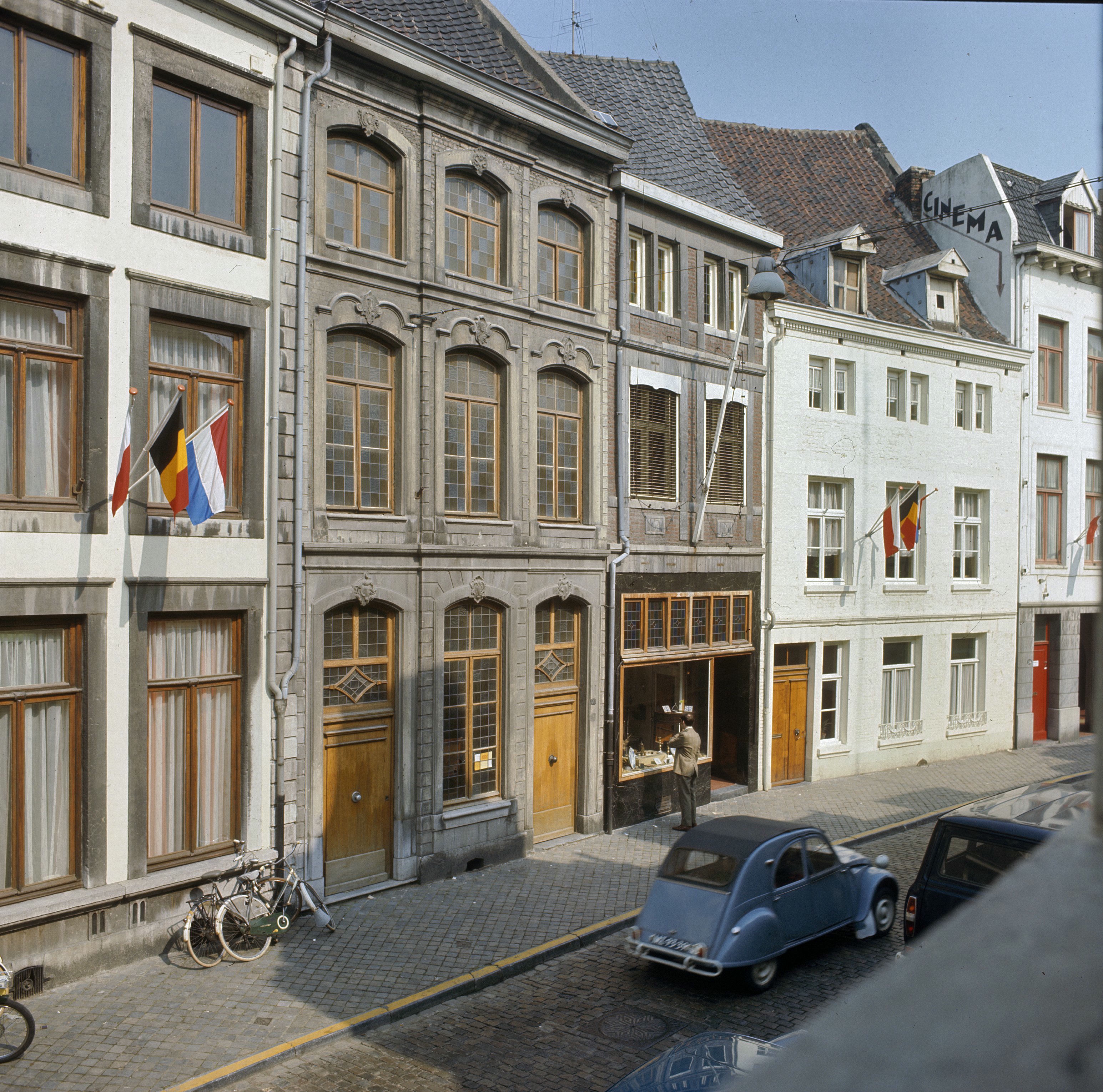 Kerken: Overzicht van de voorgevels